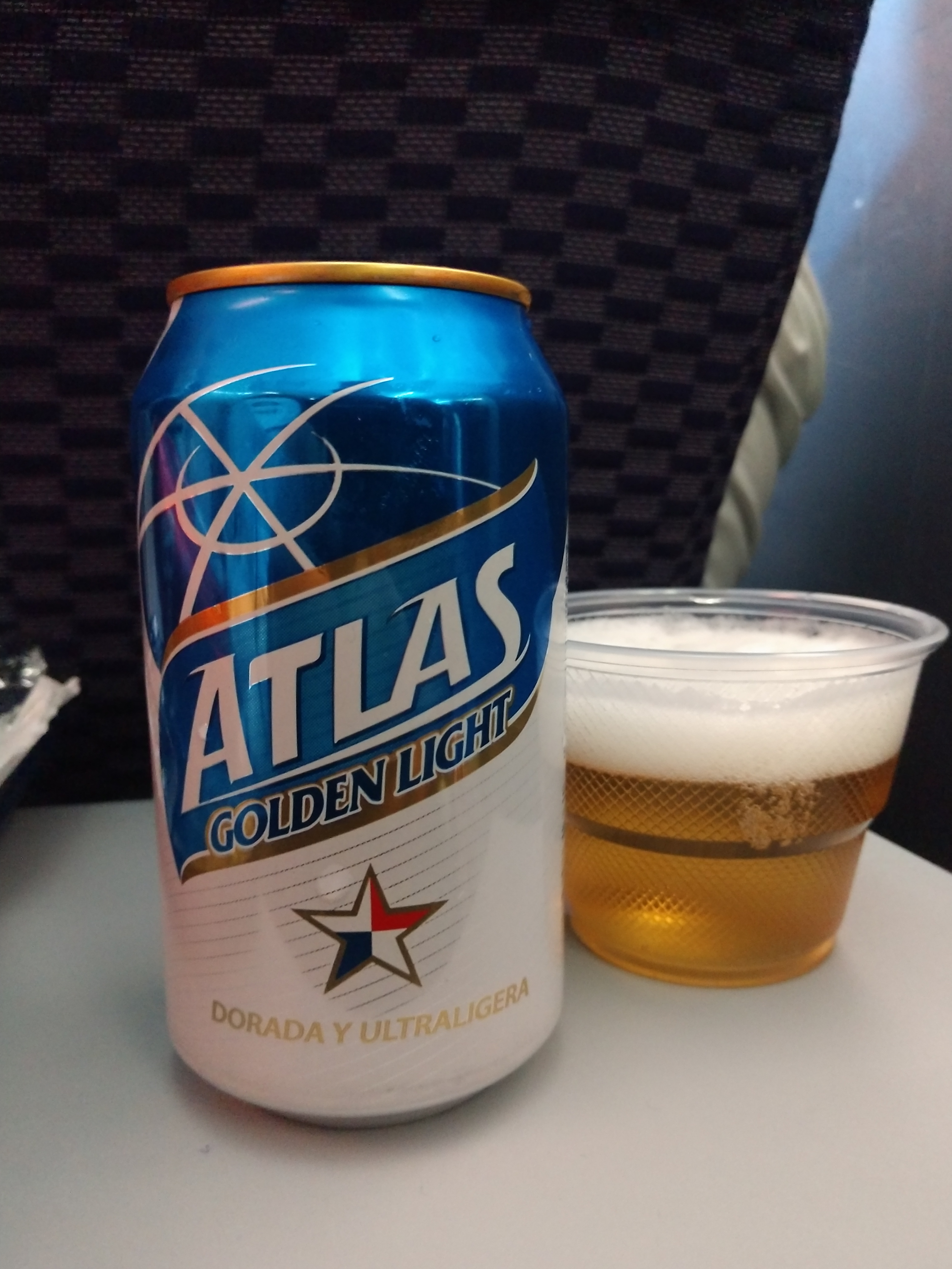 Una lata de cerveza panameña Atlas servida en un vuelo de Copa Airlines